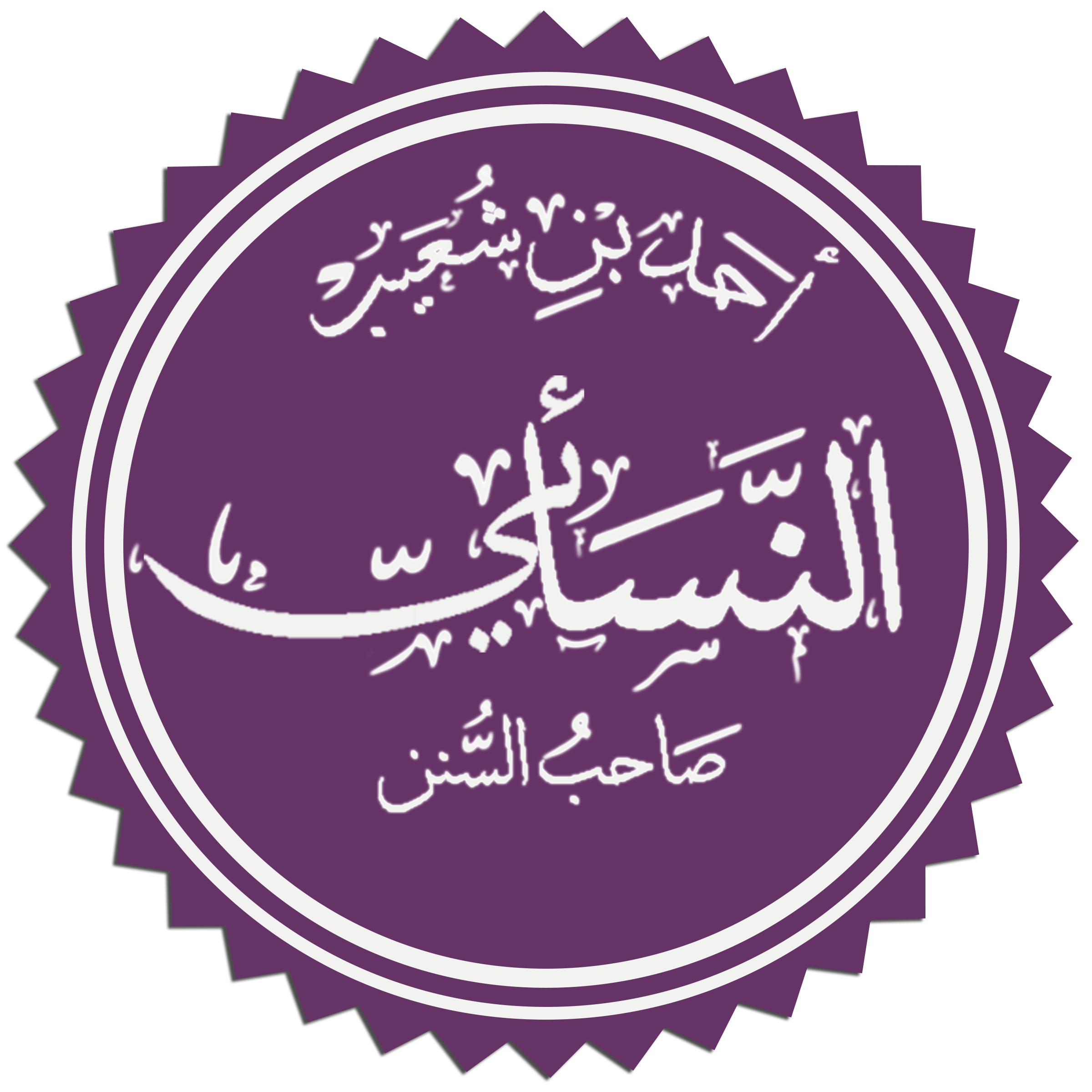 تخطيط اسم أحمد بن شعيب النسائي، صاحب السنن